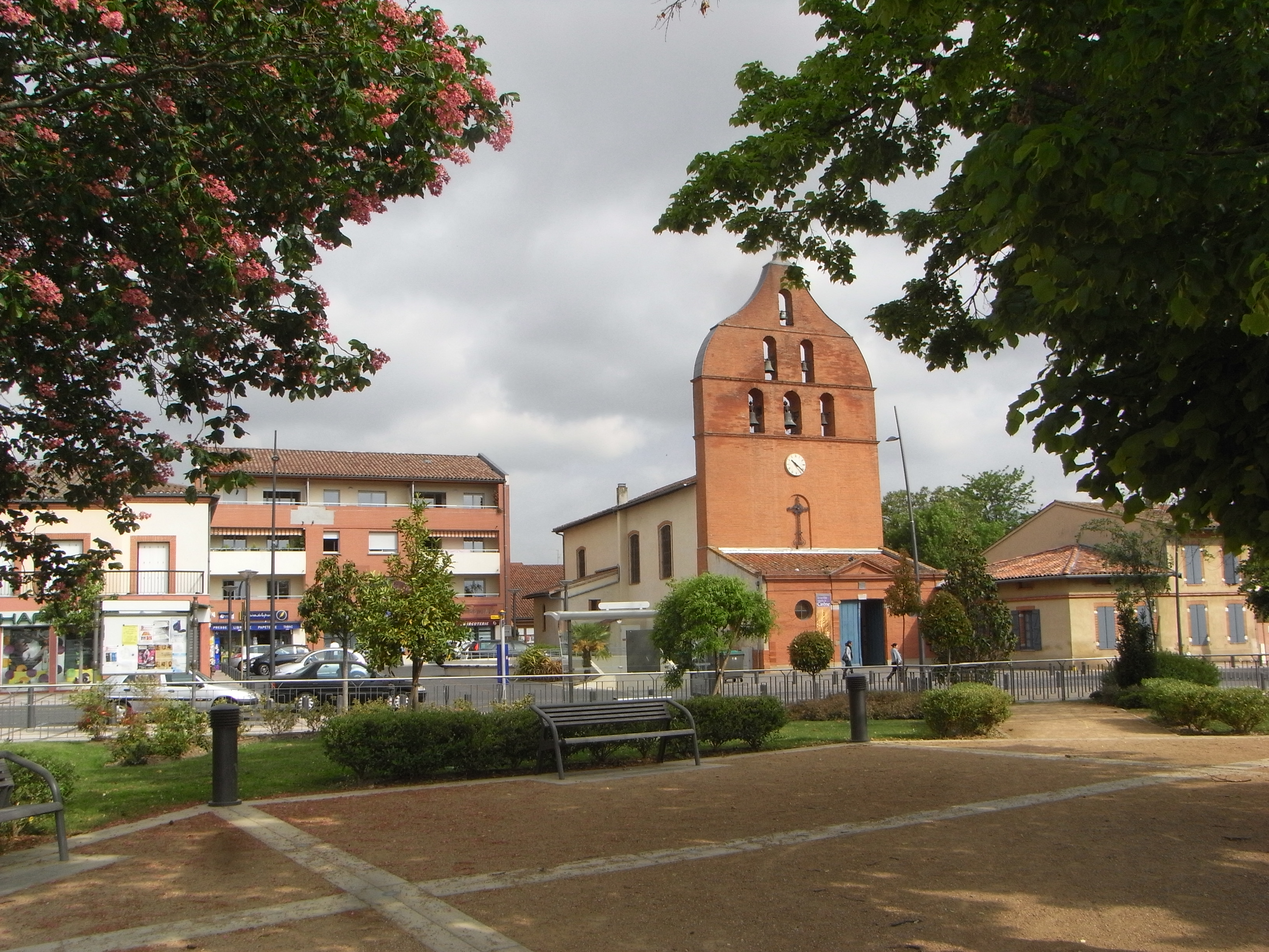 Tournefeuille (Haute-Garonne, France) : L'église Saint-Pierre vue depuis la place de la mairie.